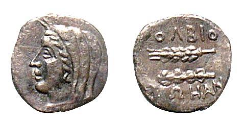 Монета из музейной коллекции. Ольвия. Уникальная драхма. III в.до н.э.